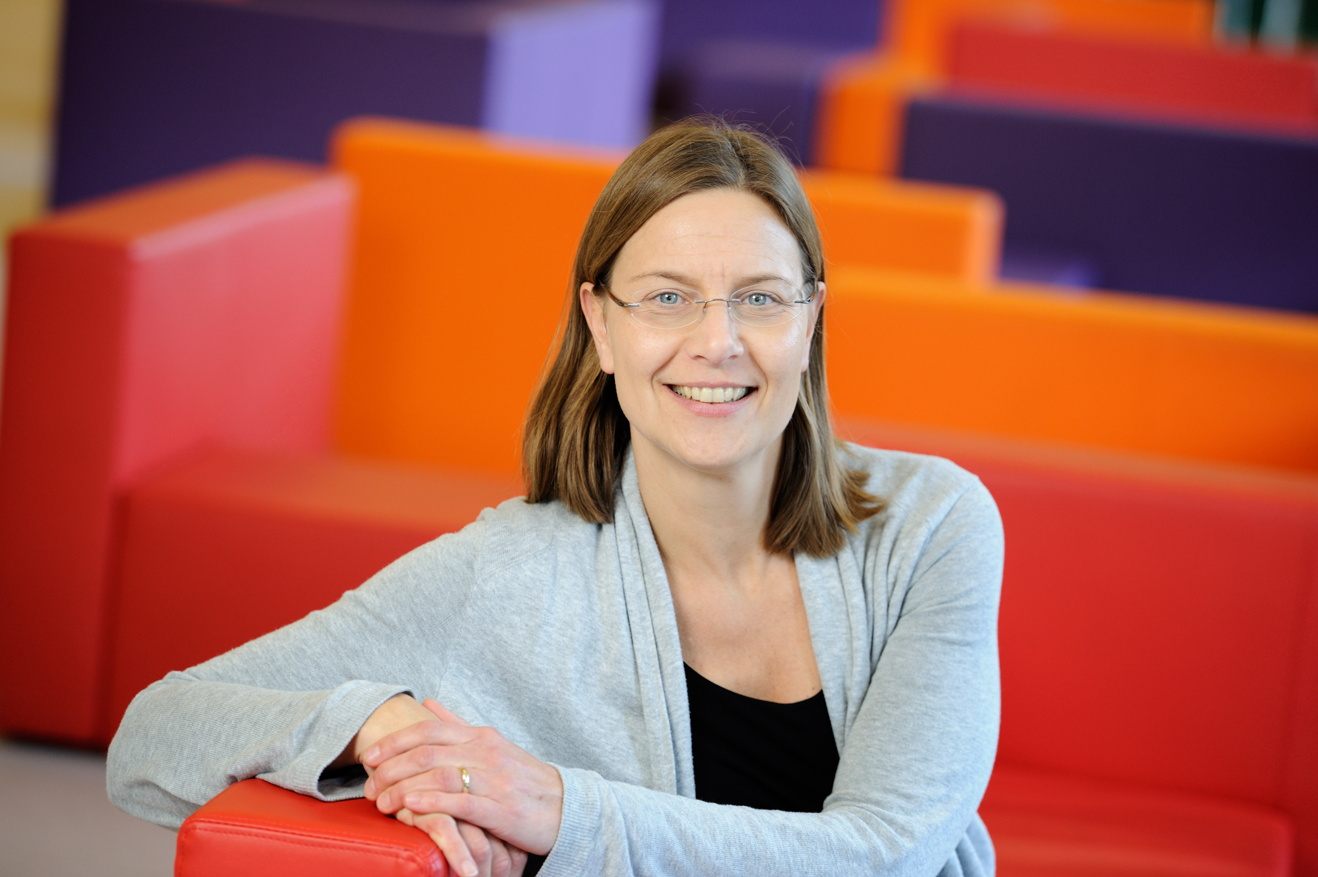 Carlijn Bouten, hoogleraar 'Cell-Matrix Interactions for Cardiovascular Regeneration' aan de faculteit Biomedische Technologie van de Technische Universiteit Eindhoven (TU/e). (Foto Bart van Overbeeke)